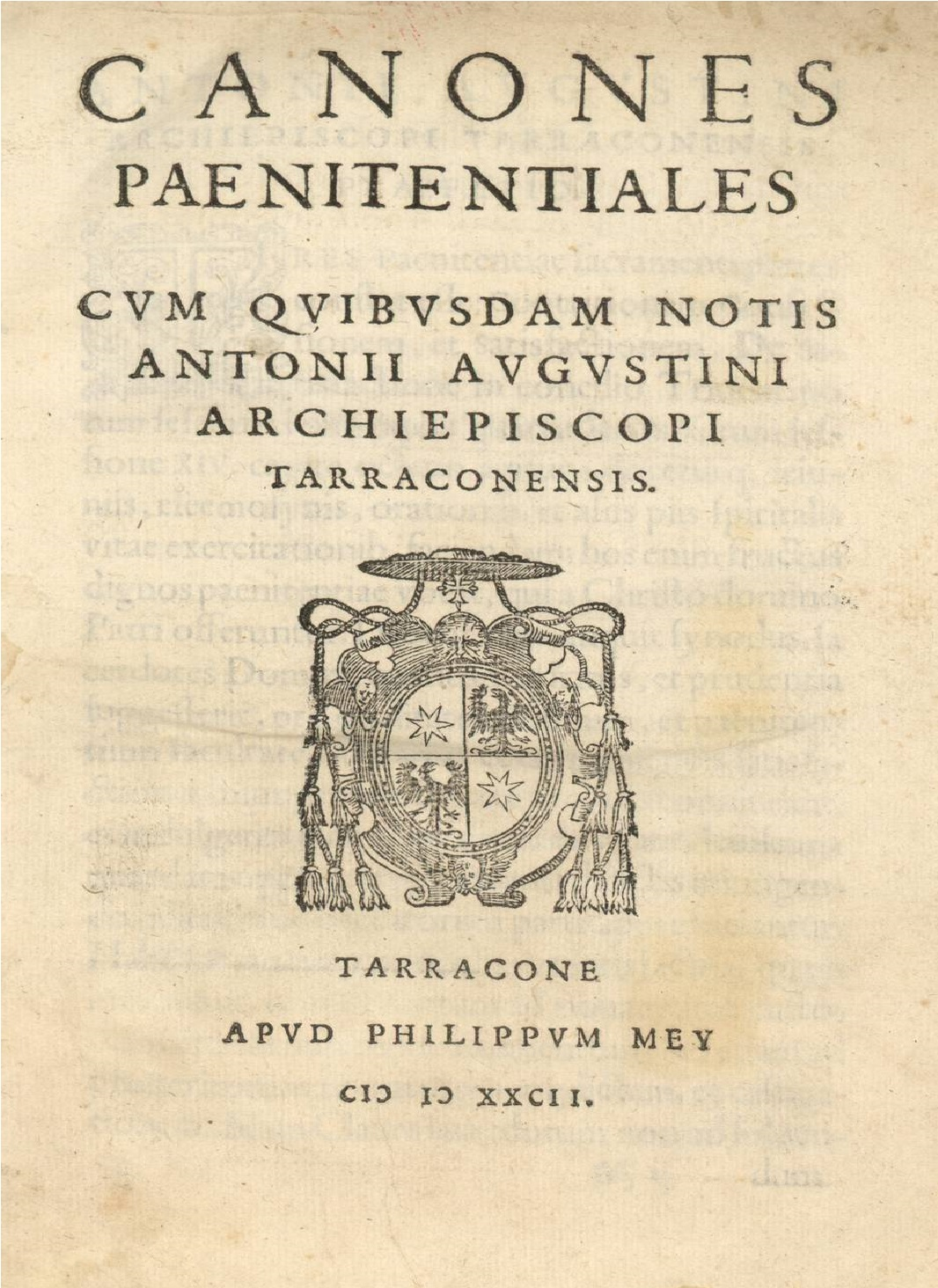 Portada de l'obra "Canones paenitentiales cum quibusdam notis Antonii Augustini" (1582). Tarracone : apud Philippum Mey, 1582.